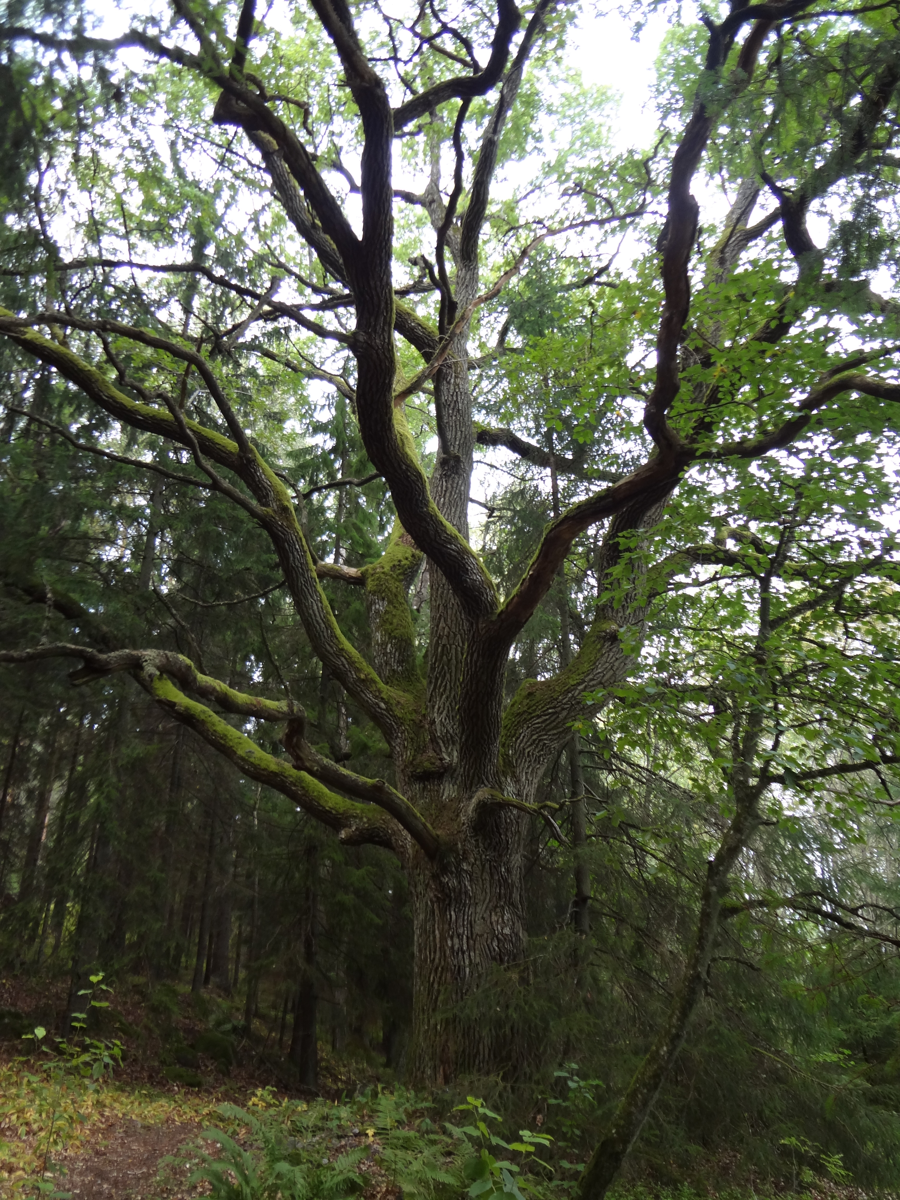 Naturreservatet Kronskogen-Stenby äng i Eskilstuna.